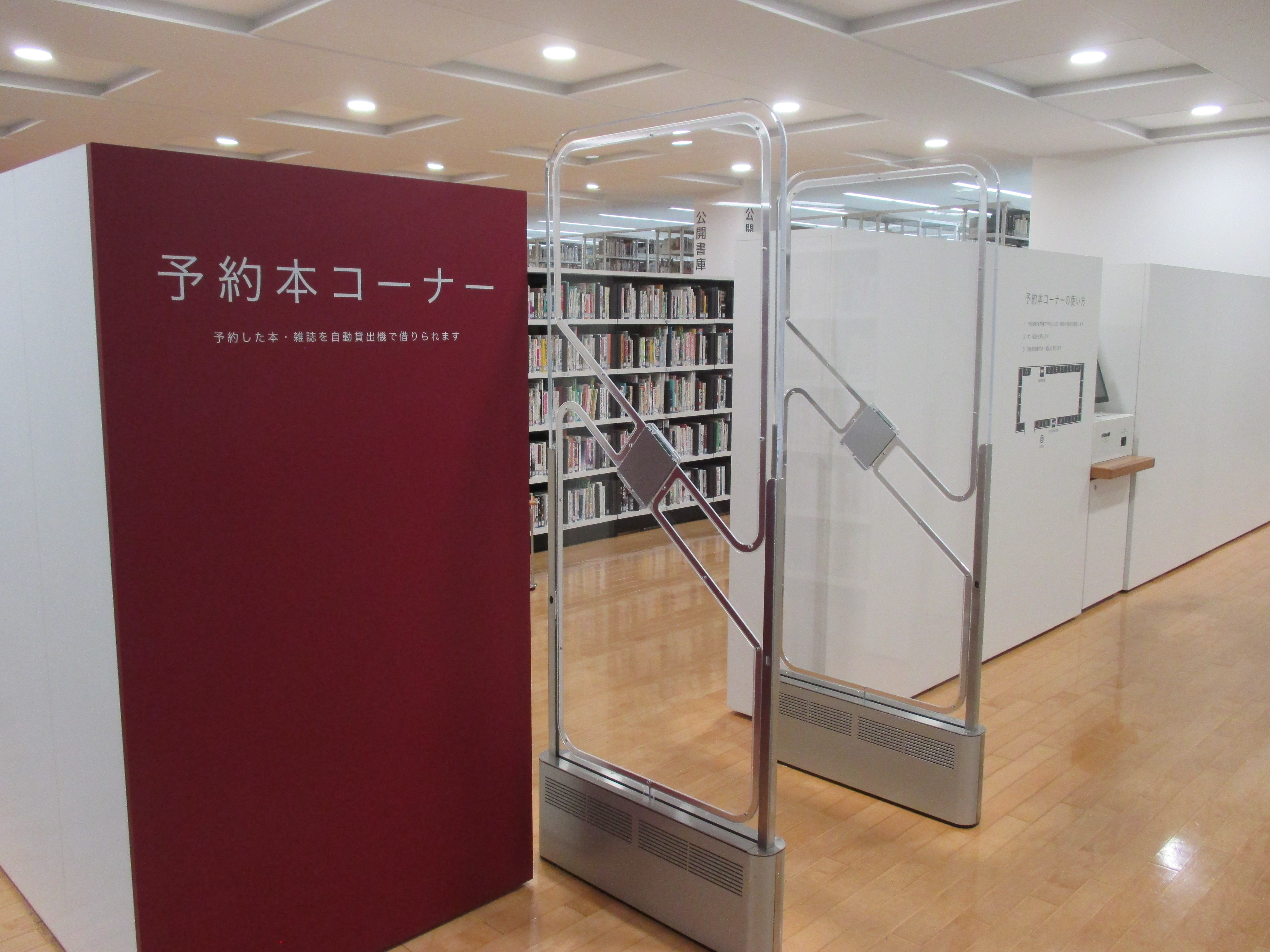 高崎市立中央図書館の予約本コーナー